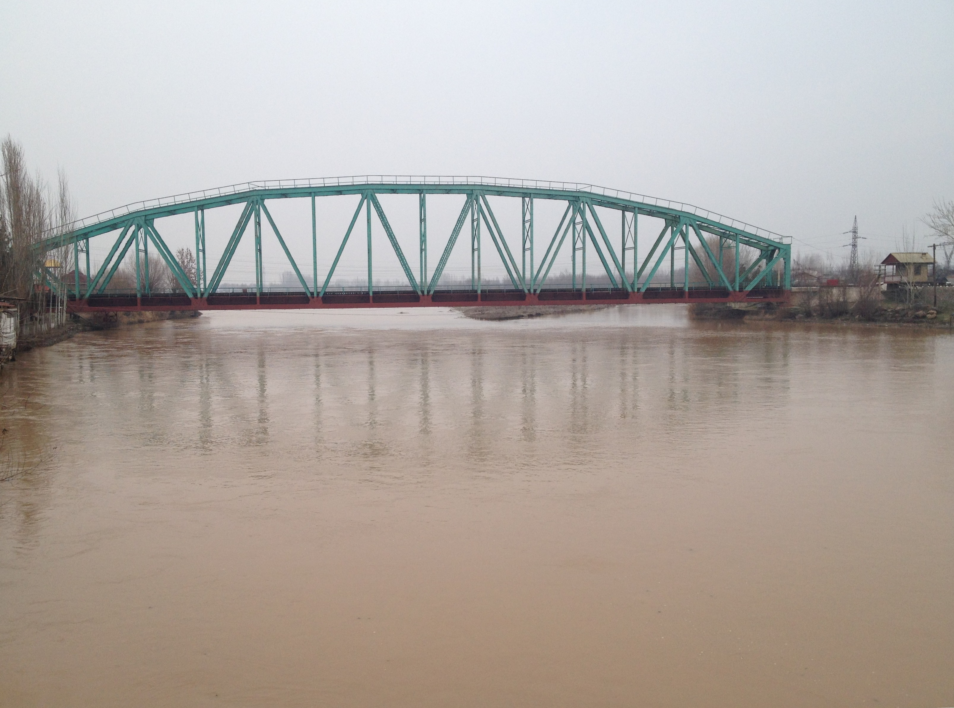 Железнодорожный мост через реку Карадарья близ Андижана